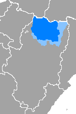 Idioma aragonés Zona de predominancia aragonesa Hablas de transición con el castellano (zona meridional) y el catalán (zona oriental)